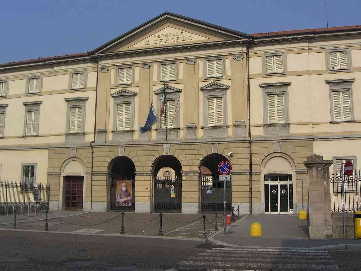 MB Monza ospedale San Gerardo vecchio facciata neoclassica 1896 architetto Ercole Balossi-Merlo